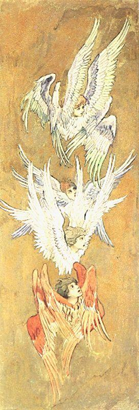 Серафимы